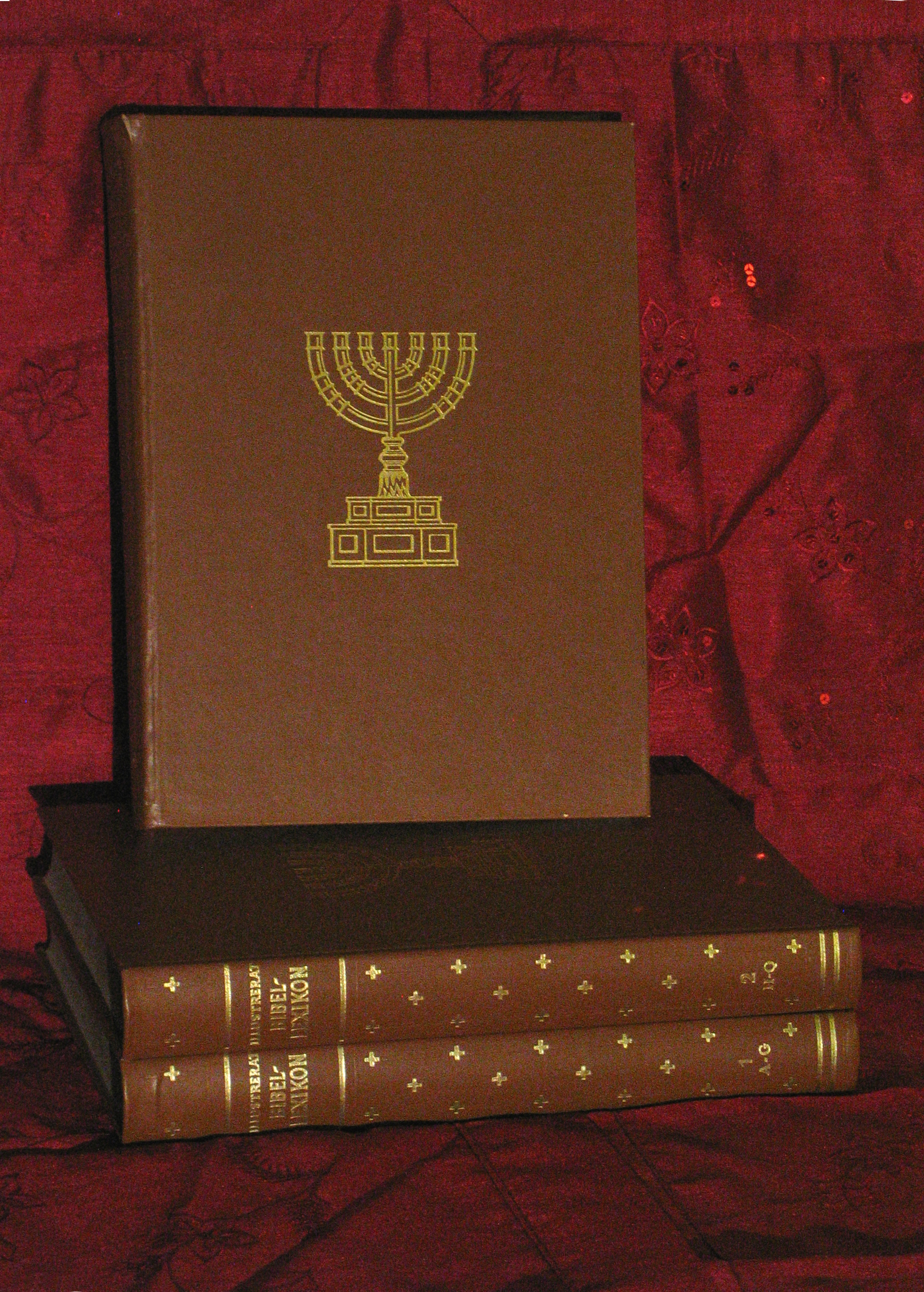 Hugo Odeberg, Thoralf Gilbrant (red.): Illustrerat bibellexikon I-III. Stockholm 1967.